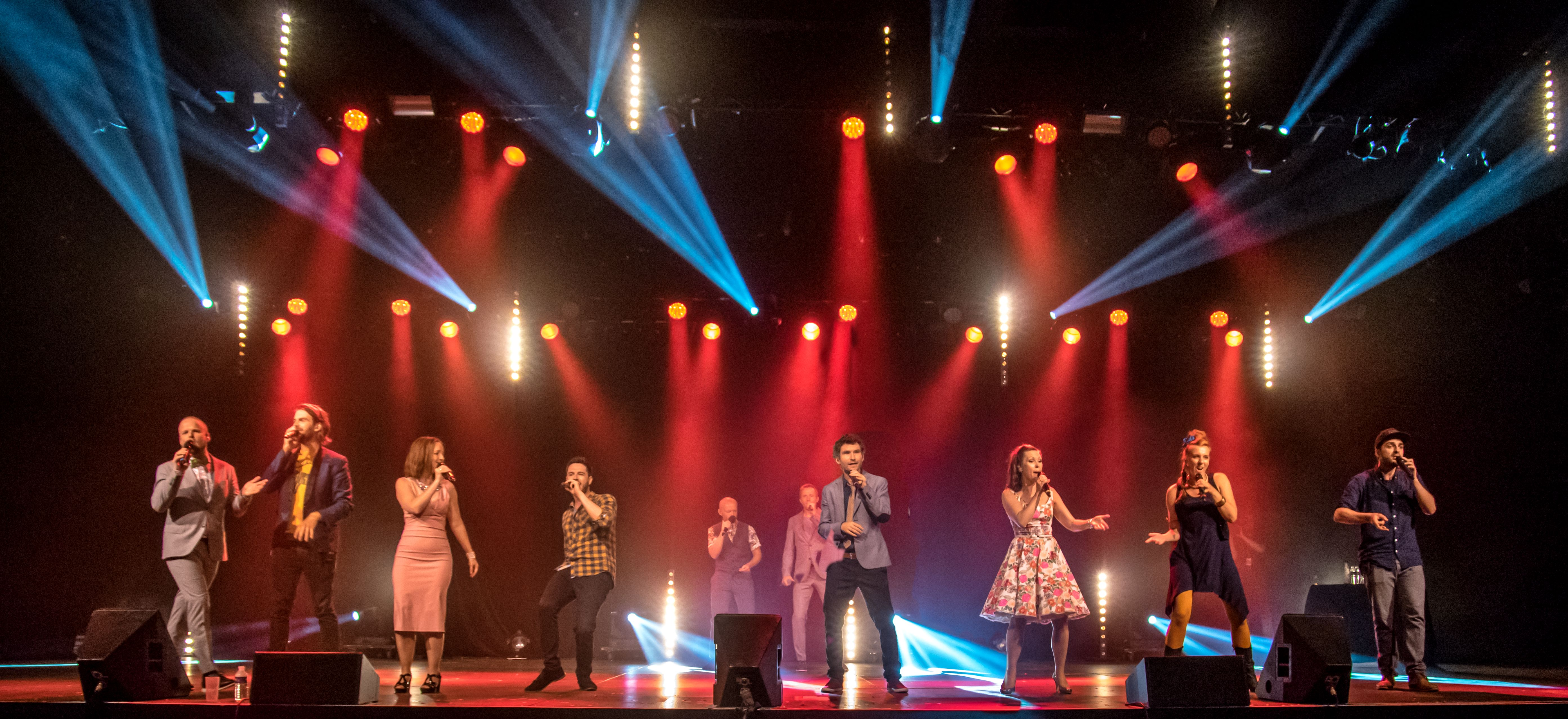 Bilder vom Zelt Musik Festival 2016 in Freiburg im Breisgau Der Schauspieler Bernd Lafrenz und der Musikverein Sölden "Sommernachtstraum"